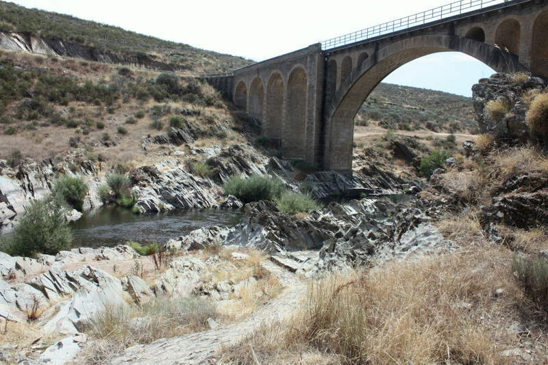 Estación de Arte Rupestre de Siega Verde (Viasta general)